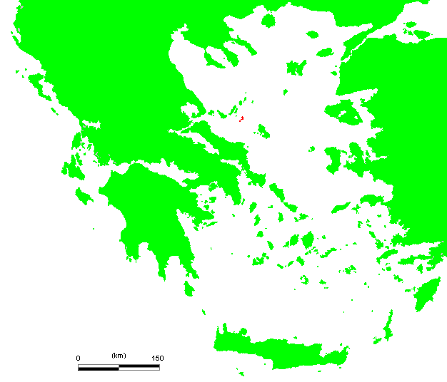 GR Skandzoera.PNG (Greek island)